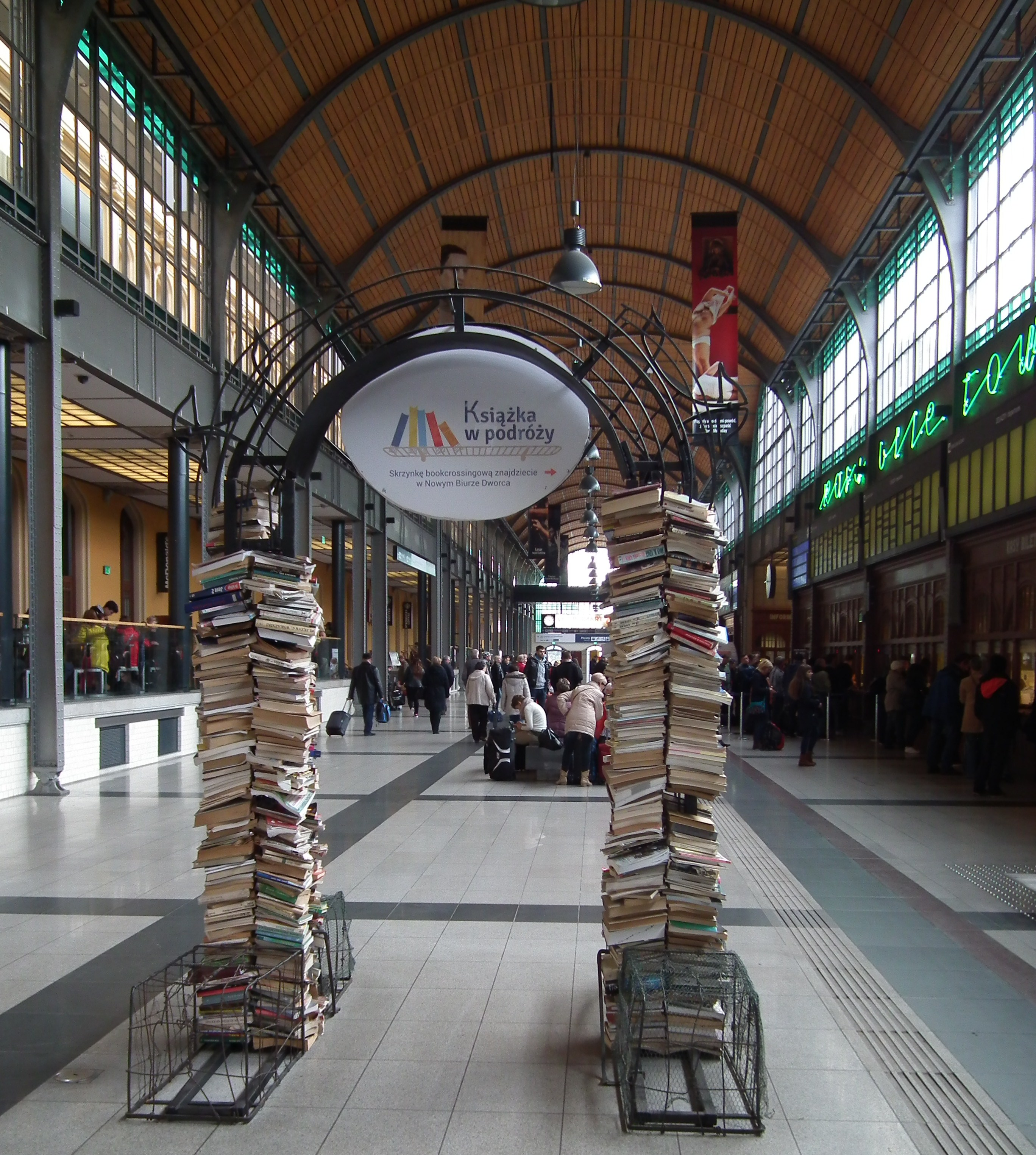 Półka bookcrossingowa na dworcu Wrocław Gł.